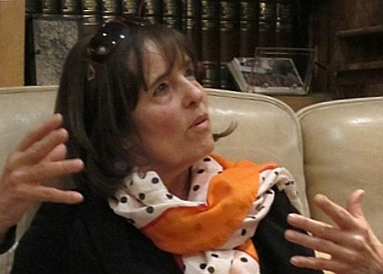 L'artiste pop américaine Jann Haworth à Paris en septembre 2012.